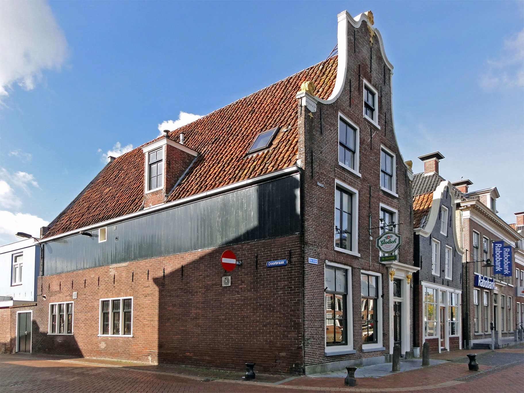 De Dijk 14 (hoek Doorbraak), Dokkum, rijksmonument